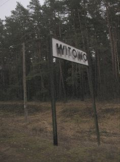 przystanek Witowo na linii kolejowej Siedlce-Siemianówka